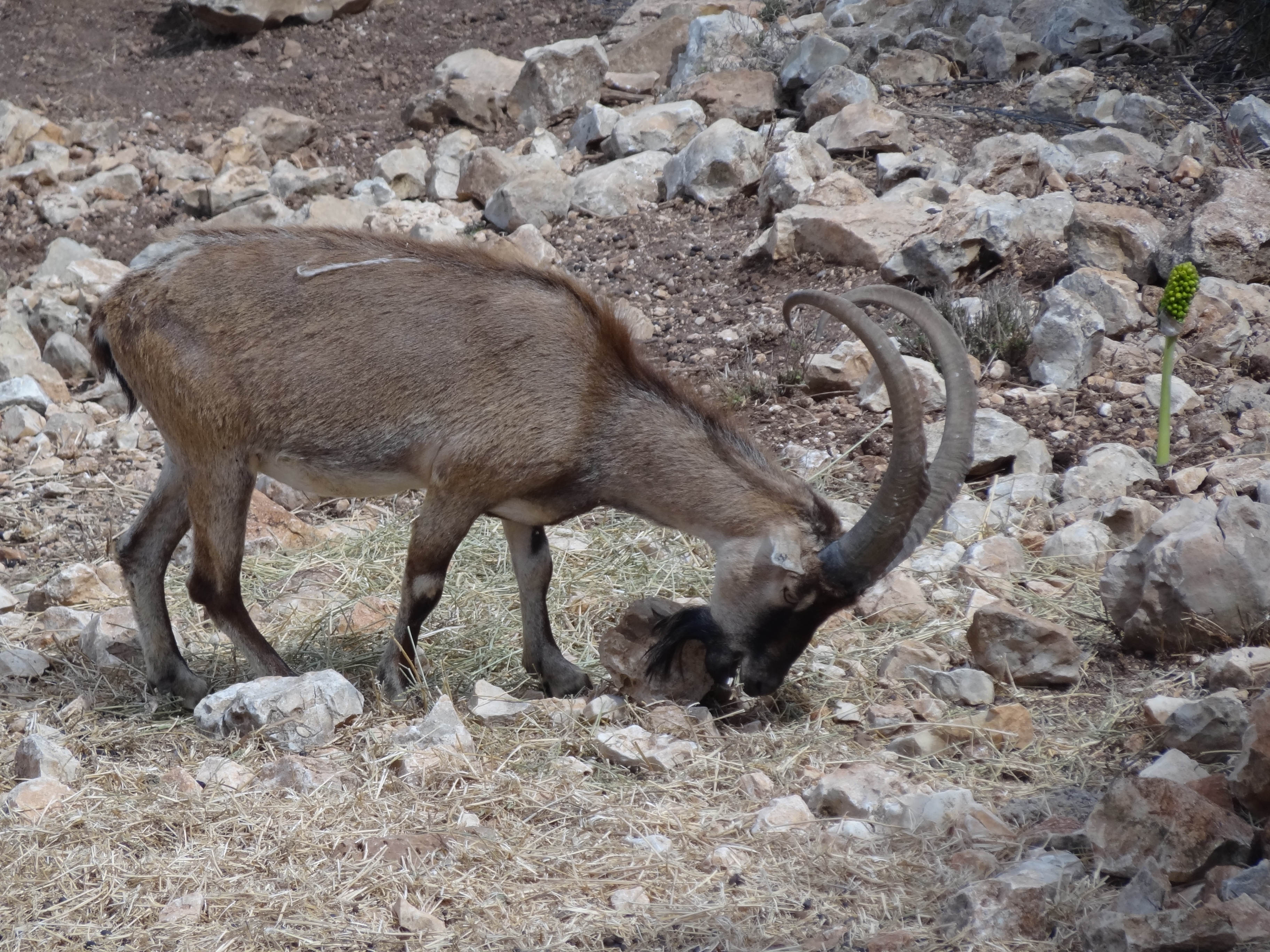 Category:Carmel Hai-Bar Nature Reserve, Animal Nature Reserve. Mount Carmel Israel חי-בר כרמל משמש כמקום רבייה לבעלי חיים שחיו בכרמל ונעלמו. ביניהם, אייל הכרמל, יחמור פרסי, נשר, עיטם זנב לבן, צבי ארצישראלי, עז בר וכבש בר עז הבר הכרתית